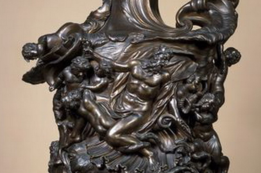 М Soldani Bronze detaіl.jpg: деталь бронзової вази з Нептуном